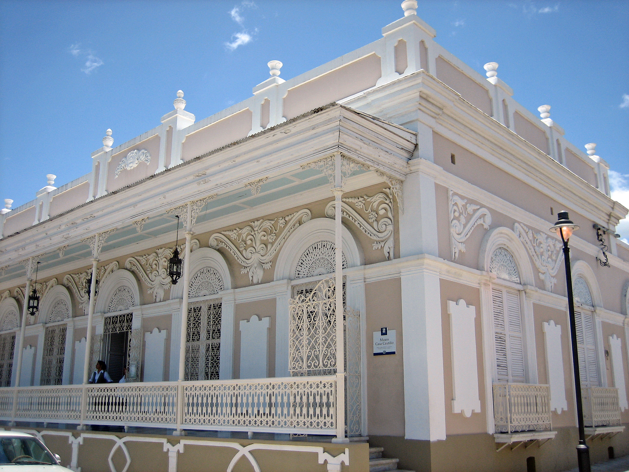 Casa Museo Cautiño, frente a la Plaza de Guayama, es un ejemplo de la arquitectura urbana de finales del siglo XIX.